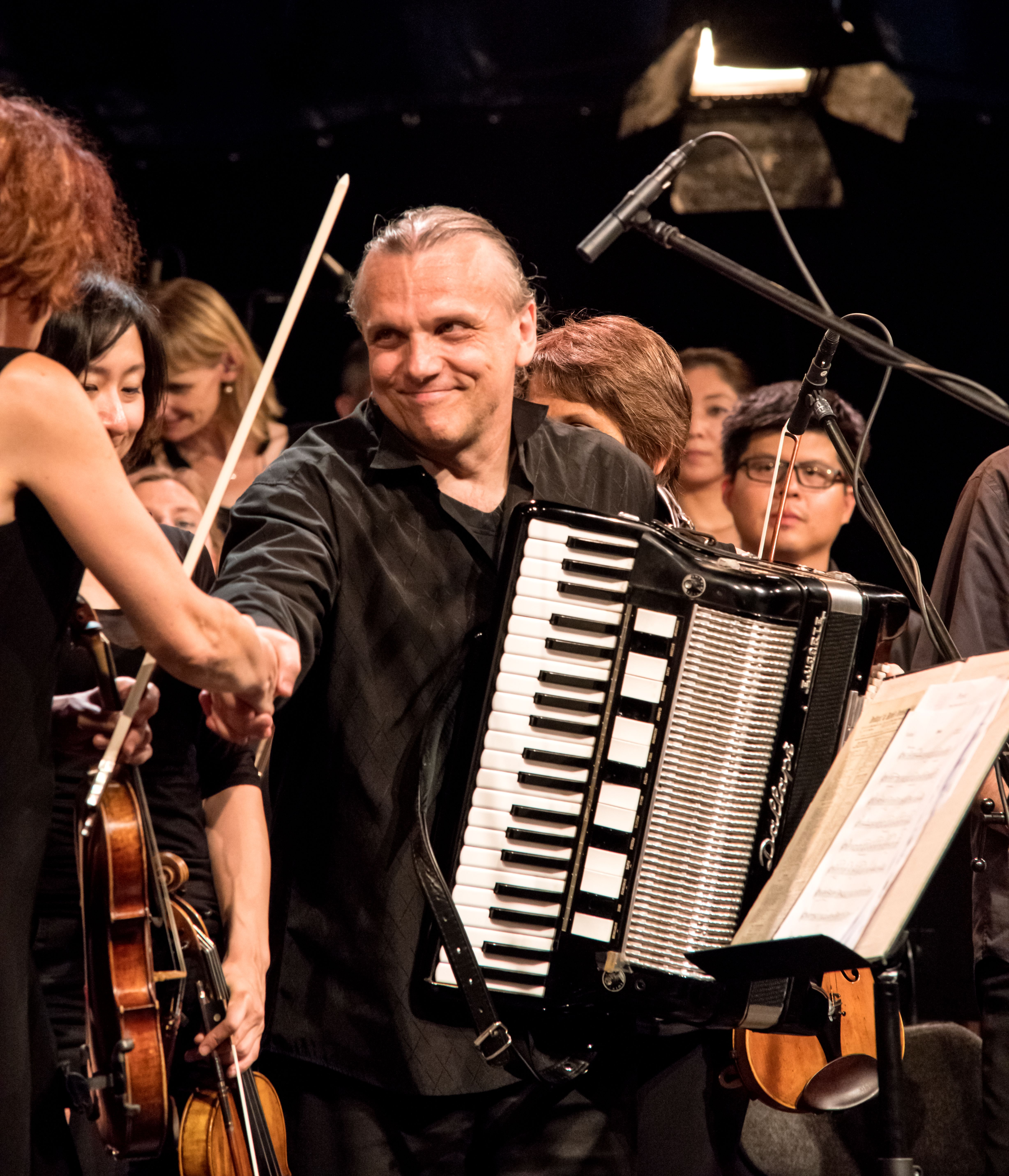 Bilder vom Zelt Musik Festival 2016 in Freiburg im Breisgau Die Gala